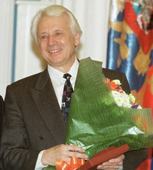 МОСКВА, КРЕМЛЬ, ЕКАТЕРИНИНСКИЙ ЗАЛ. Церемония вручения Государственных премий и премий Президента. С художественным руководителем Большого детского хора ВГТРК Виктором Поповым.